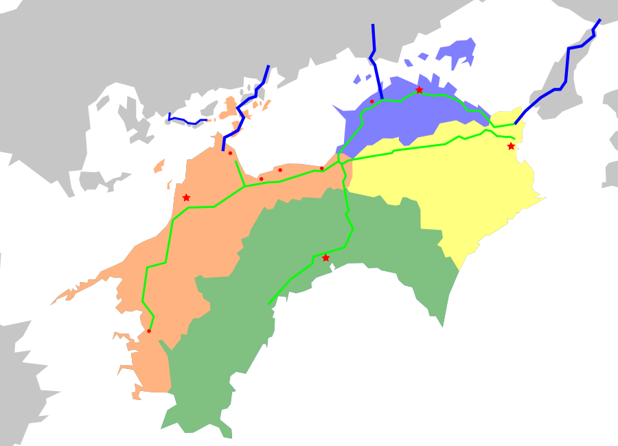 地図の下地は「国土画像情報（カラー空中写真） 国土交通省」を基に作成